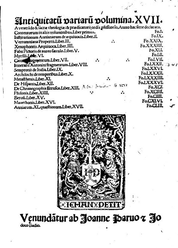 Pagina (forse frontespizio?) di Antiquitatum variarum volumina XVII - Reprod. de l'éd. de : S.l : I. Badio, 1515 (CLXXI f.); Cambridge (Mass.) : Omnisys, ca 1990; Description matérielle: 1 microfilm ; 35 mm [1]